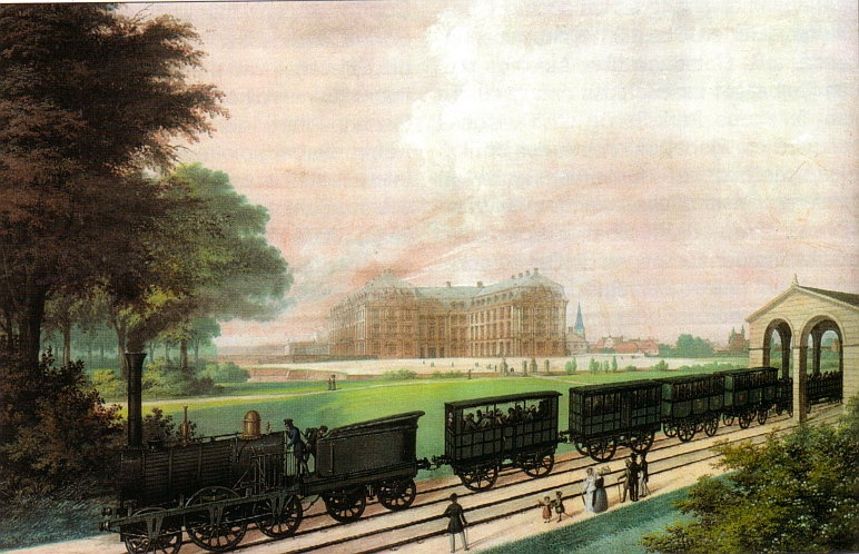 Eröffnung der Bahnstrecke Köln-Bonn (1844). Eisenbahnzug vor Schloss Augustusburg in Brühl (Rheinland) Das Bild stammt von Nikolaus Christian Hohe (1798 – 1868) und wurde 1841 (vor der eröffnung) gemalt, das Original befindet sich im Archiv der Stadt Brühl.